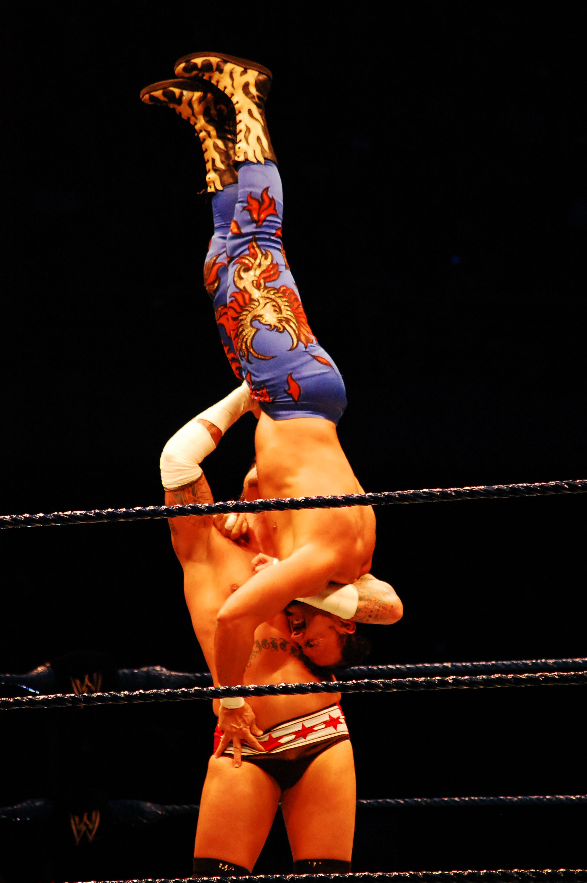 cm punk aplicando un suplex de bandera al chavo guerrero